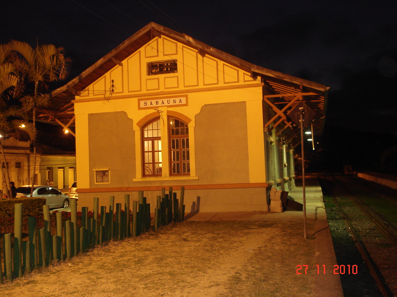 Inauguração da nova iluminação da Estação Sabaúna, nas comemorações do aniversário do distrito em novembro/2010.